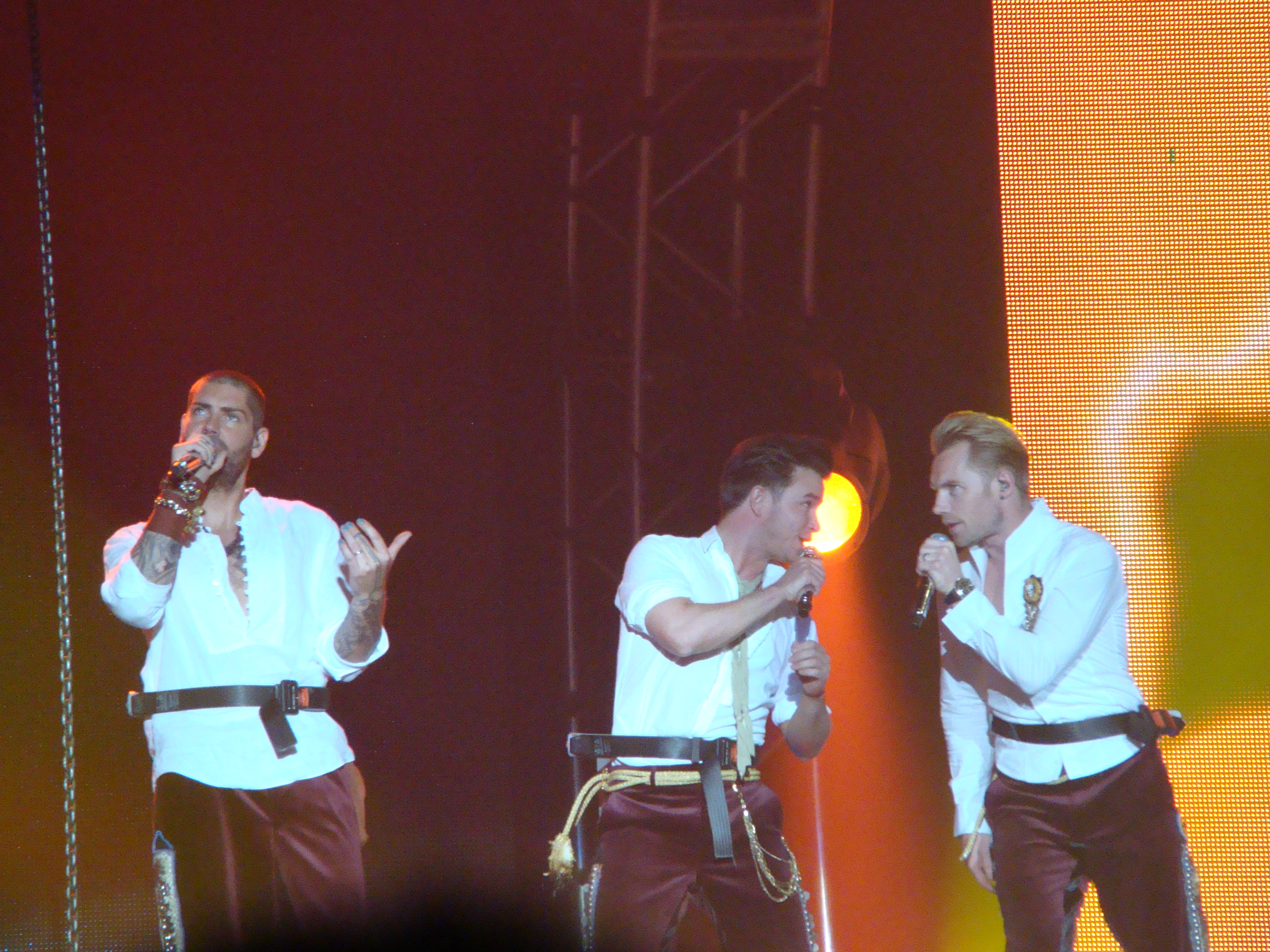 Boyzone